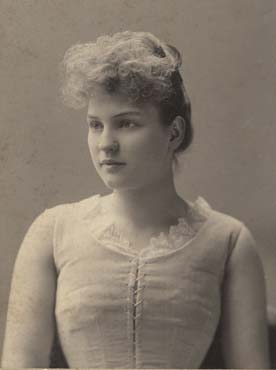 Marie Bankhead Owen (1869-1958)